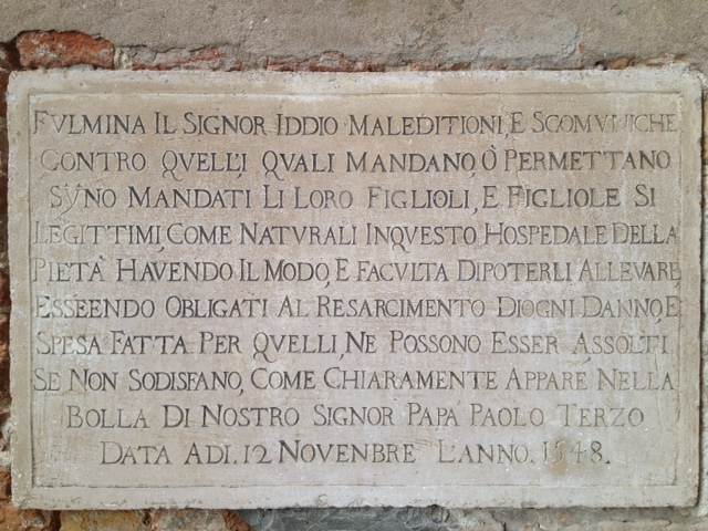 Inscripció sobre el mur de l'església de la Pietà a Venècia